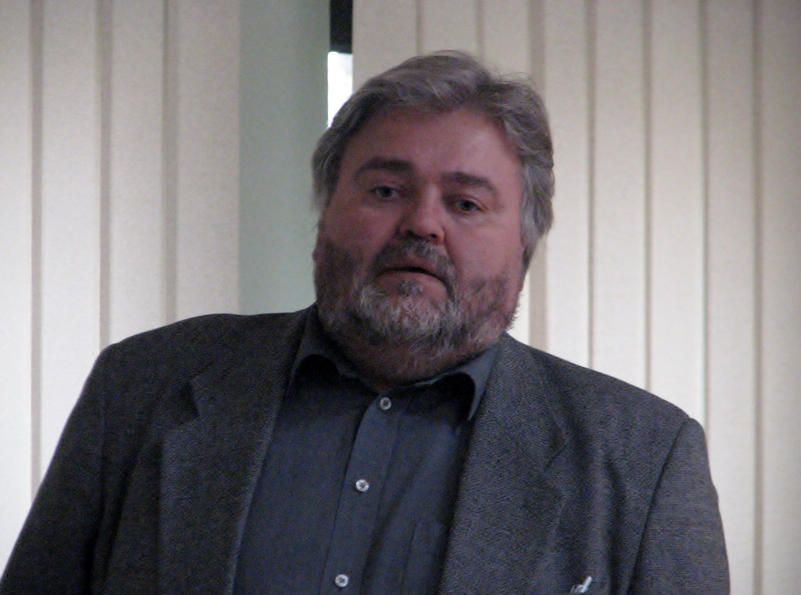 Andres Adamson Tallinna Raamatumessil